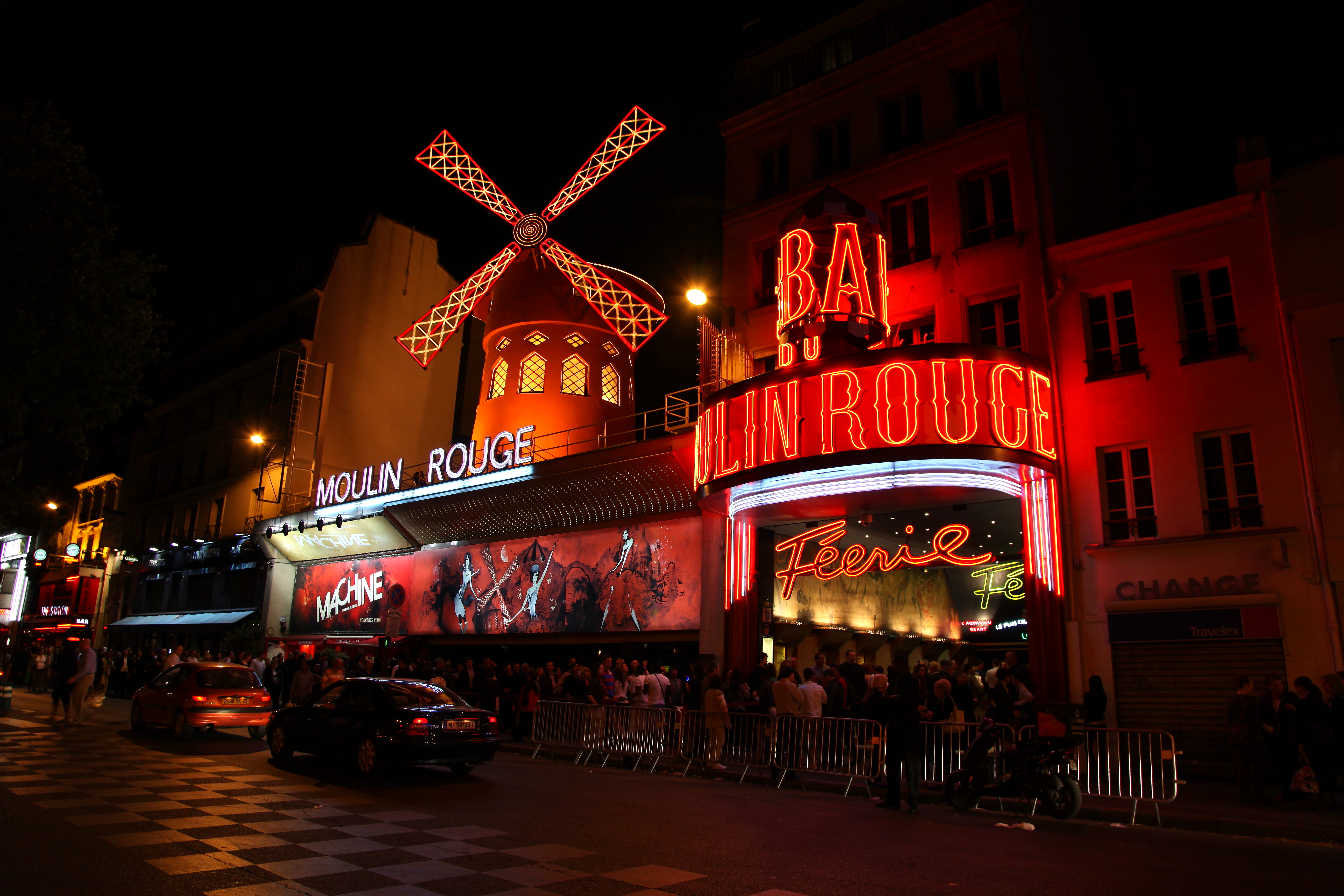 Moulin Rouge, Paris, France.